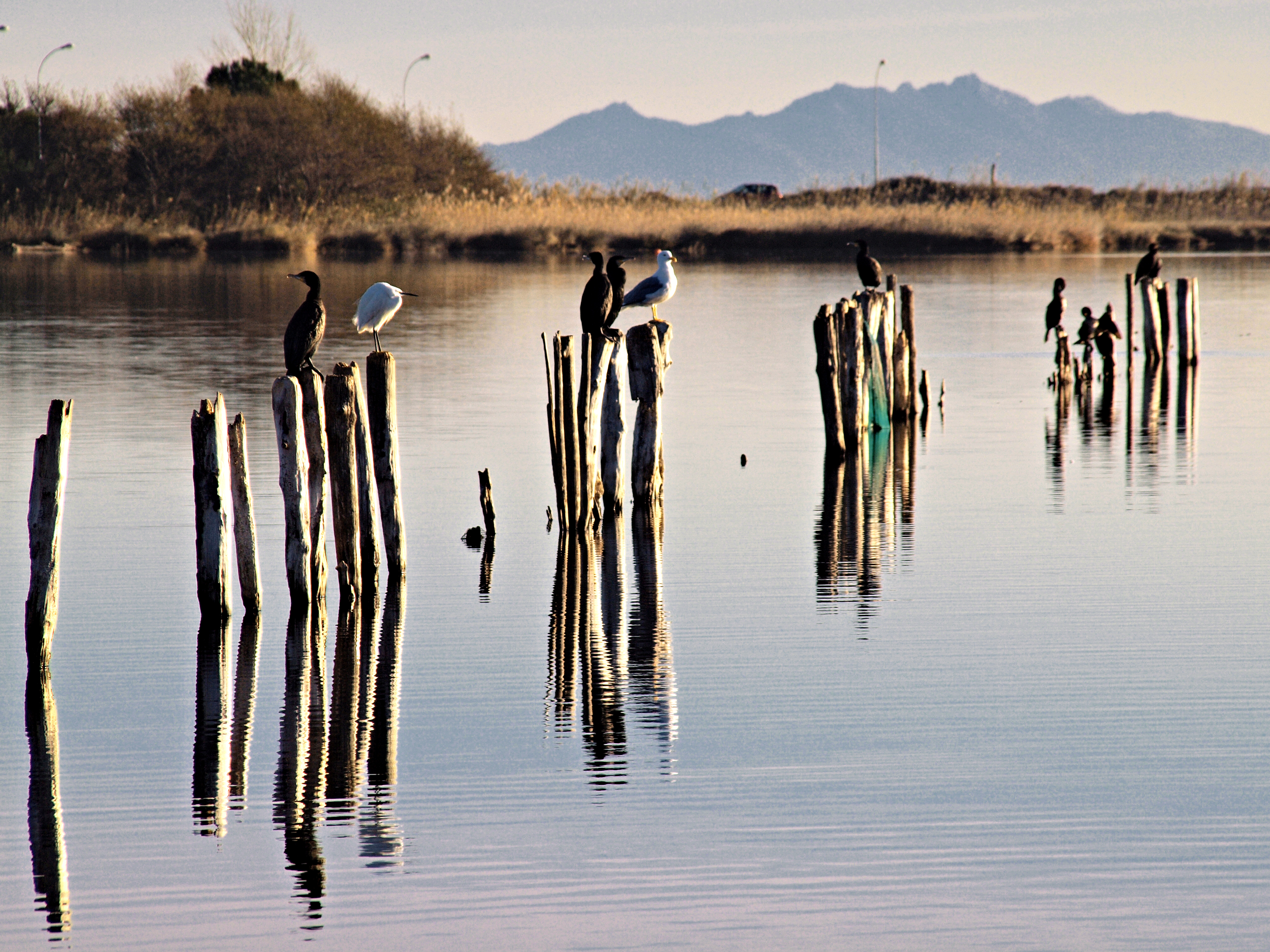 Etang de Biguglia - Cormorans noirs, aigrette, goéland